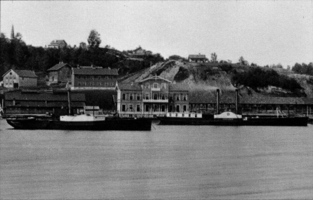 DS Skibladner, der unter Denkmalschutz stehende älteste noch in Betrieb befindliche Raddampfer der Welt auf einer historischen Aufnahme von 1866. Die Aufnahme entstand 1866 im Hafen von Eidsvoll am Mjøsasee (Norwegen)